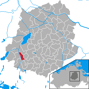 Duckow, Landkreis Demmin, Mecklenburg-Vorpommern